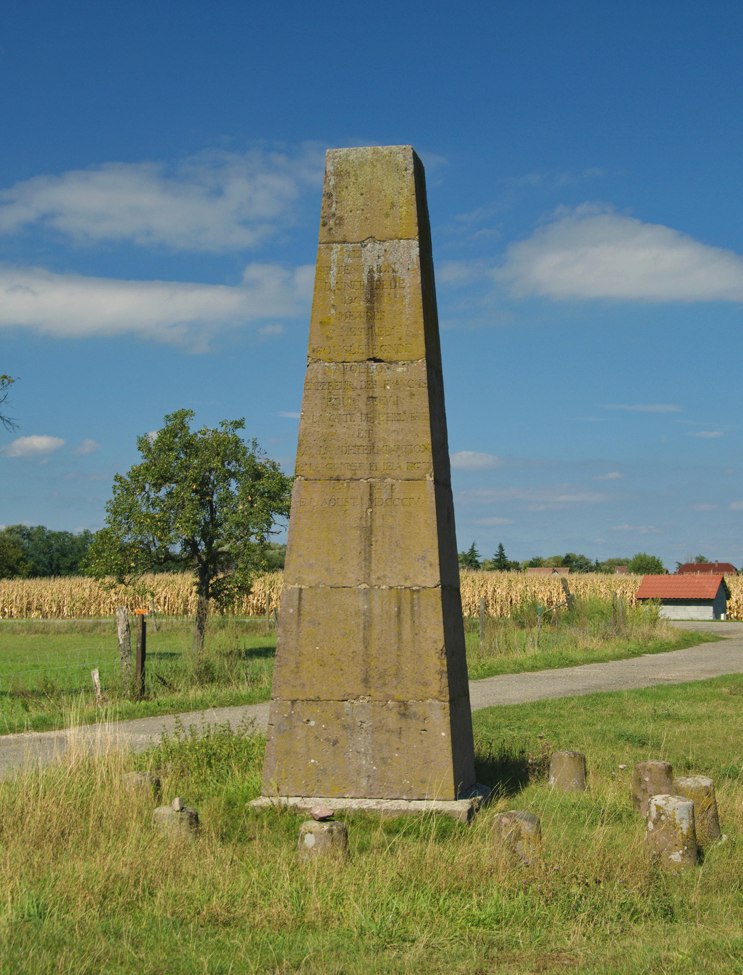 Stèle géodésique d'Oberhergheim, Maschinenzug (Classé, 1979) .